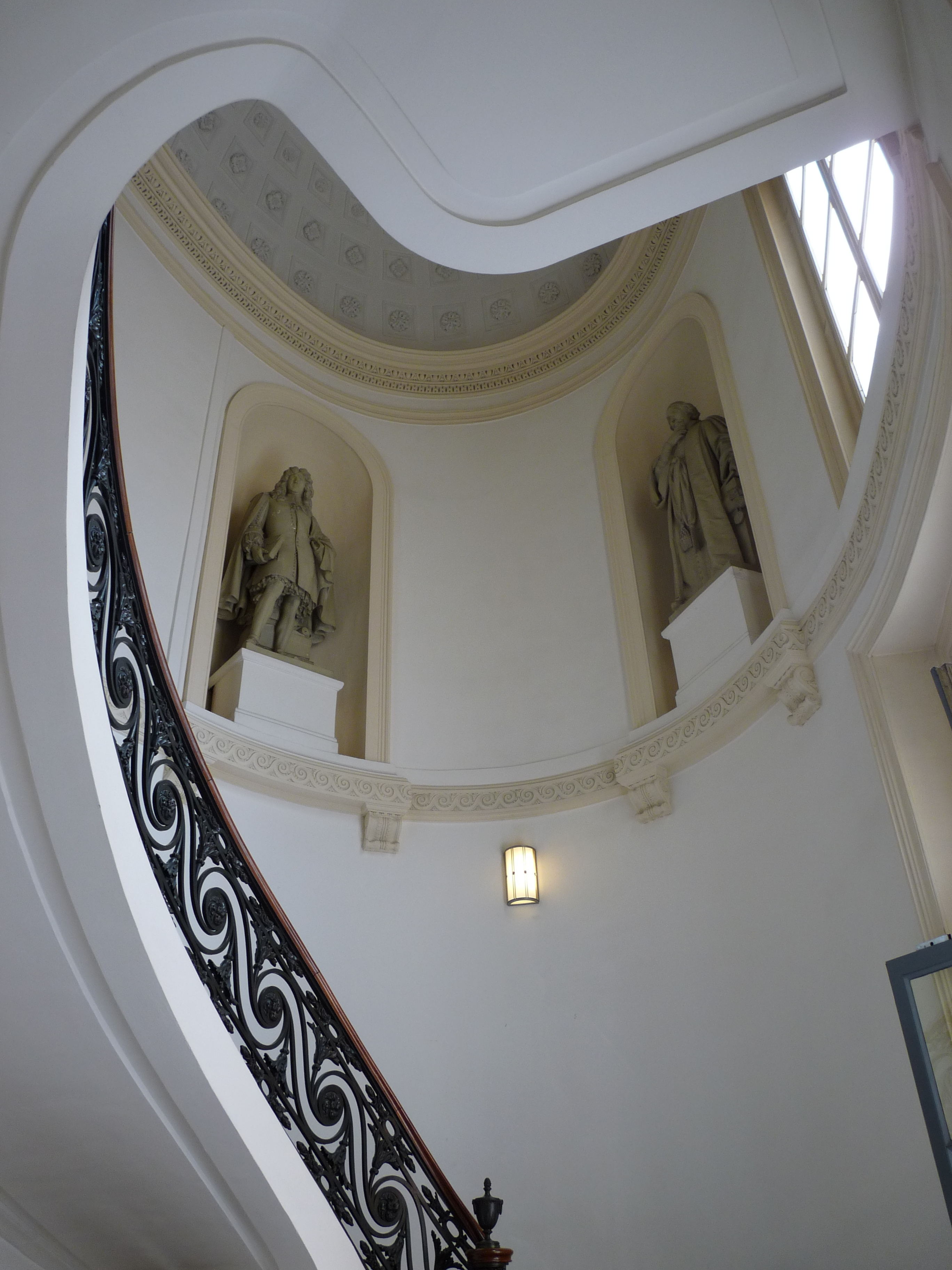 L'escalier de l'hôtel de Rochechouart à Paris, aujourd'hui ministère de l'éducation nationale. Photo prise lors des journées du patrimoine 2011.